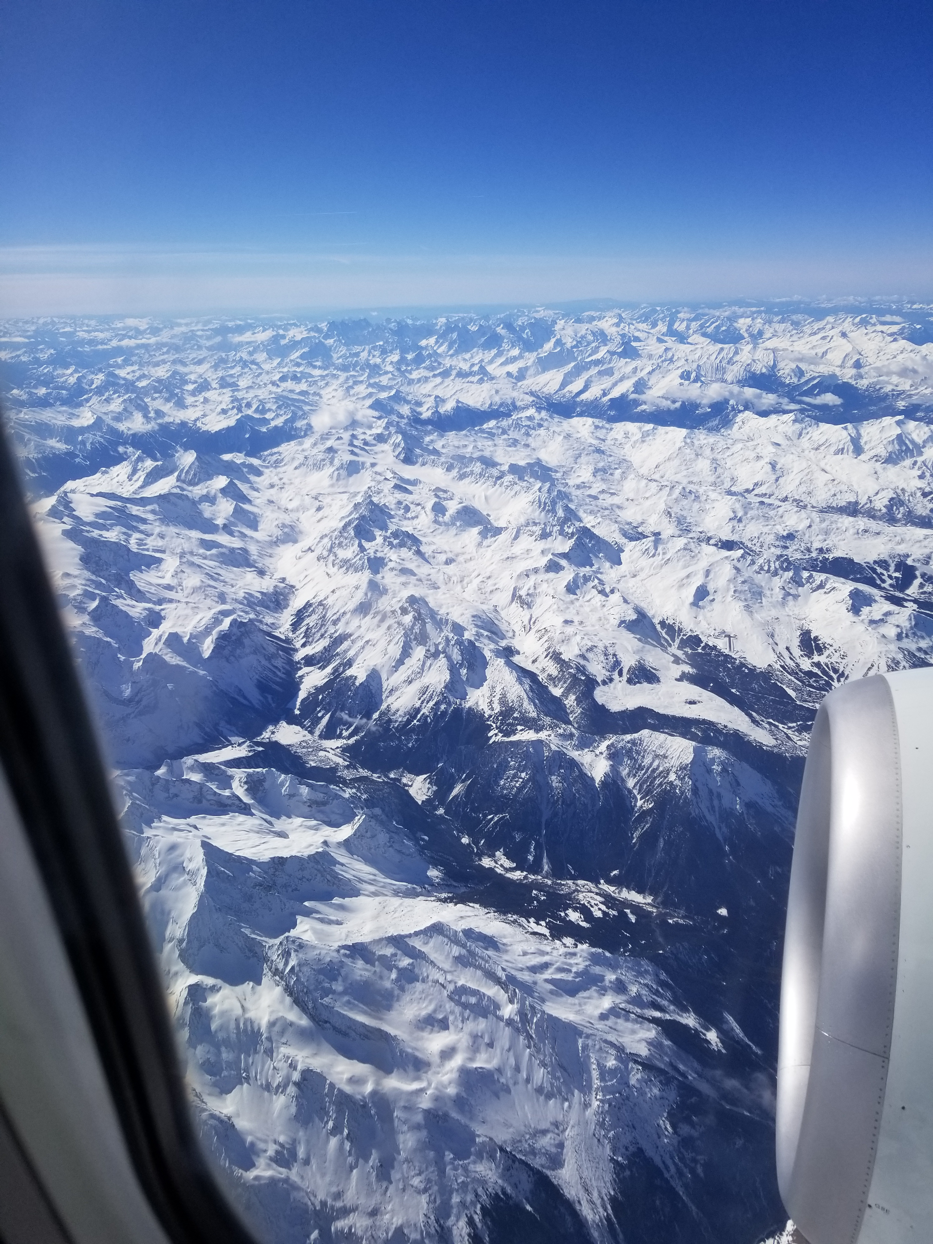 רכס האלפים מהאוויר